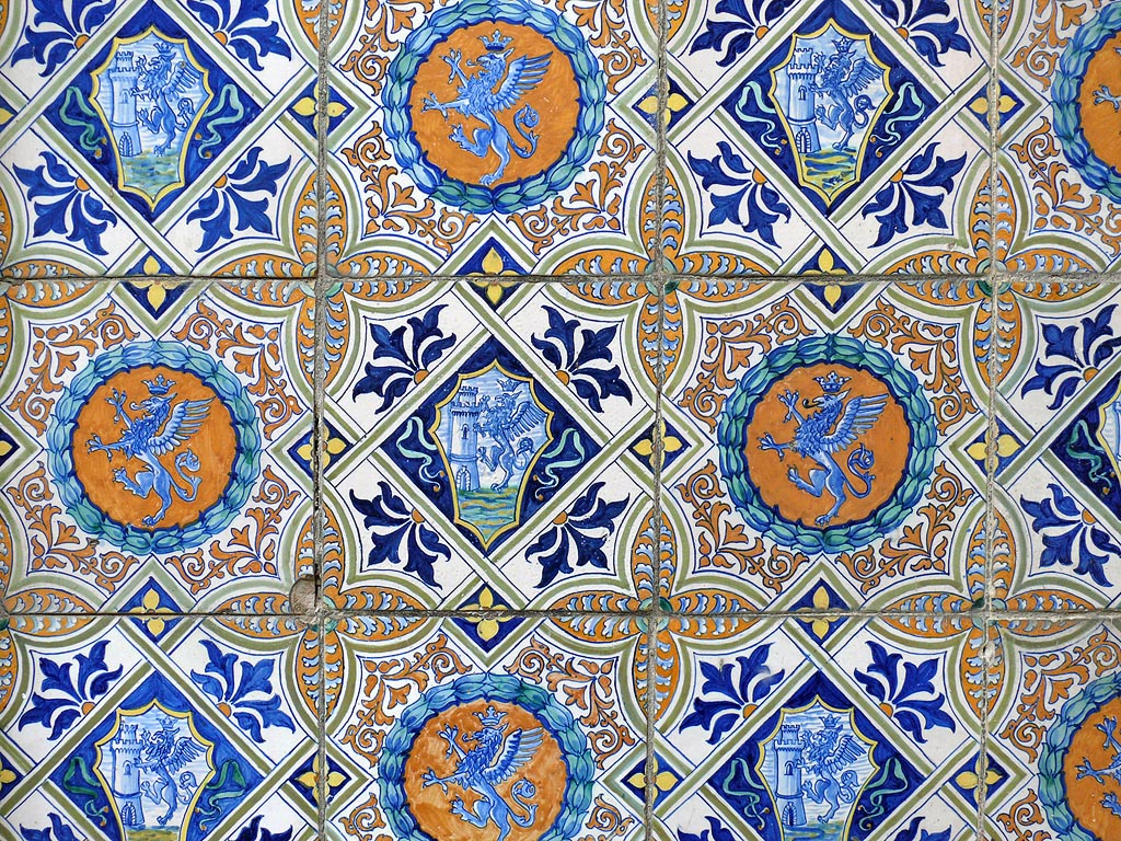 Deruta, tiles